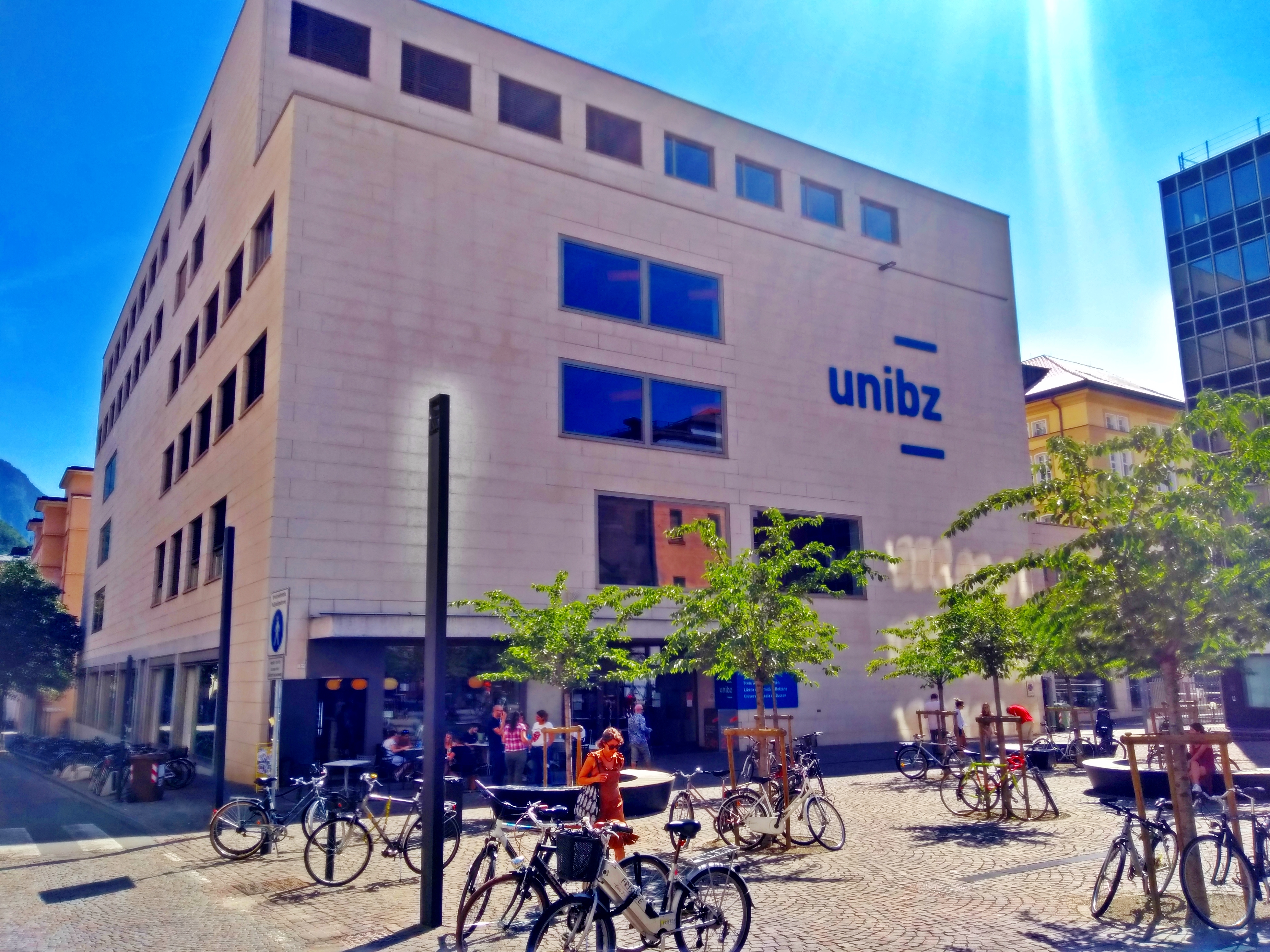 Library of University of Bolzano